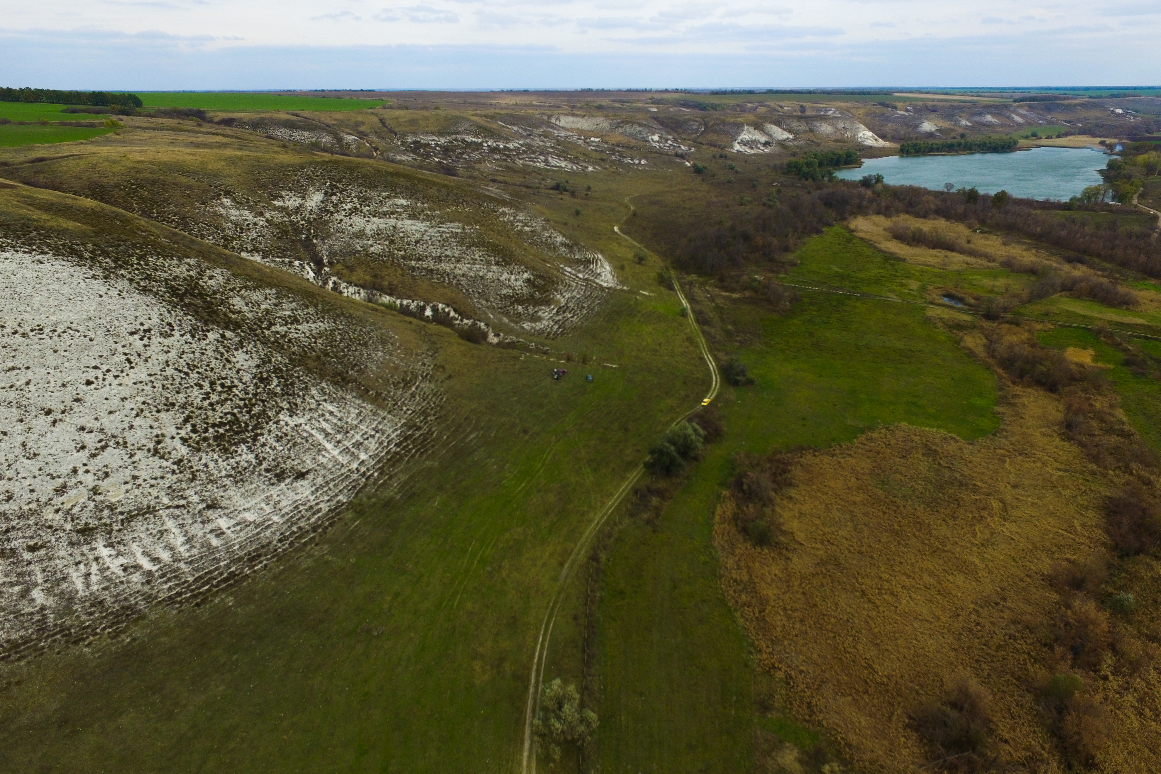 Краматорське скелеподібне оголення верхньої крейди